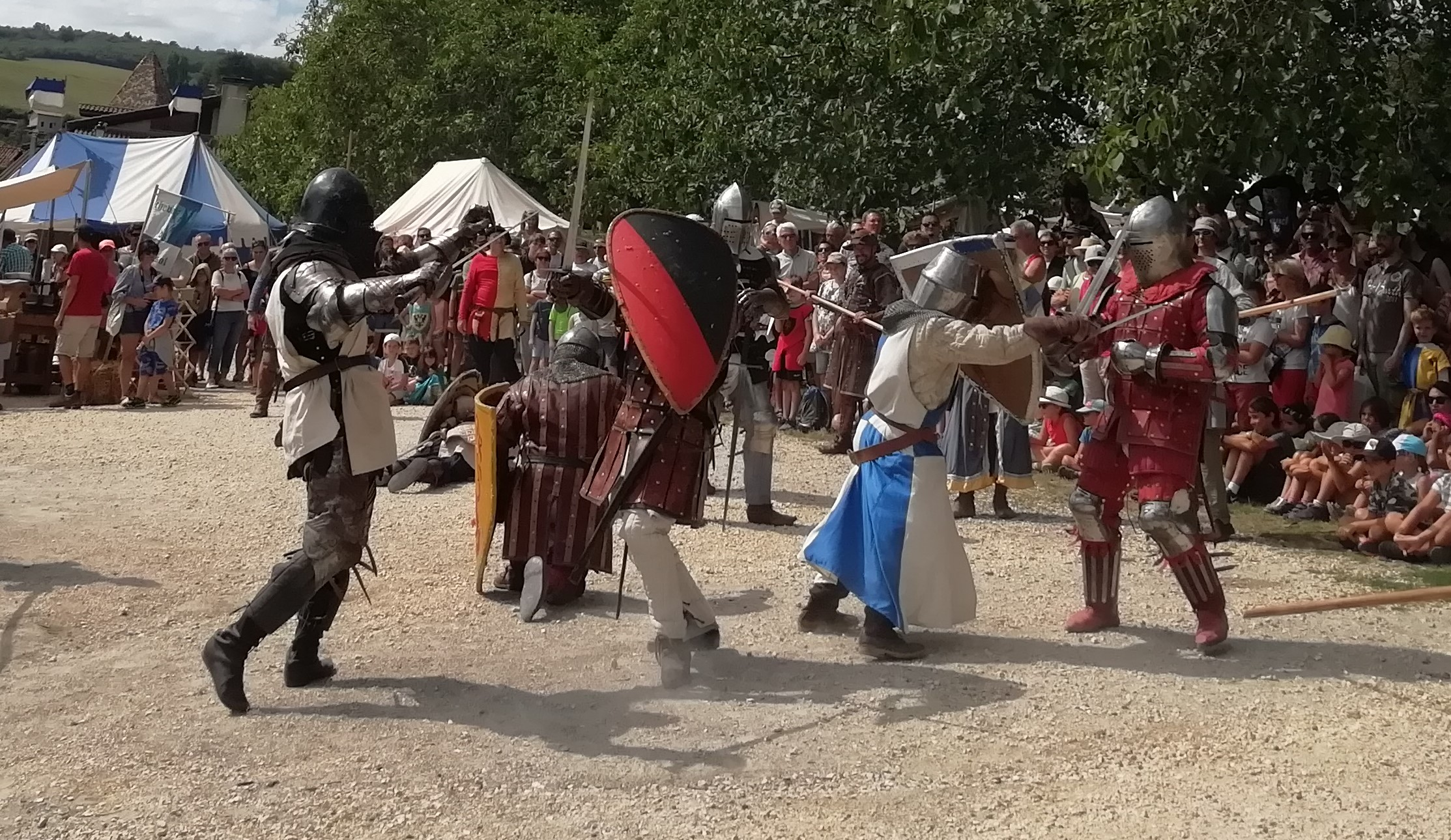 Combat de mélée de la Guilde de la Grenouille à la Médiévale de St Antoine l'Abbaye, Saint-Antoine-l'Abbaye, Isère, France.